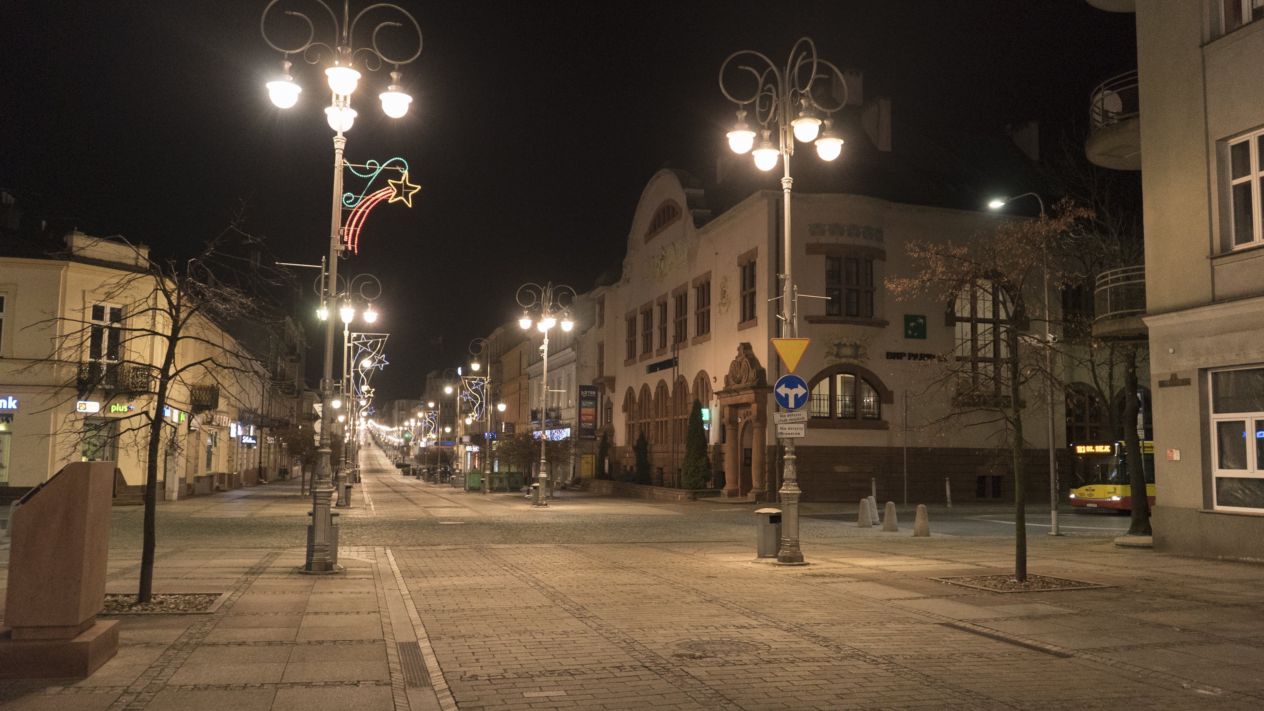 Kielce, Skrzyżowanie ulic Sienkiewicza i Paderewskiego nocą (widok od strony Dworca PKP)